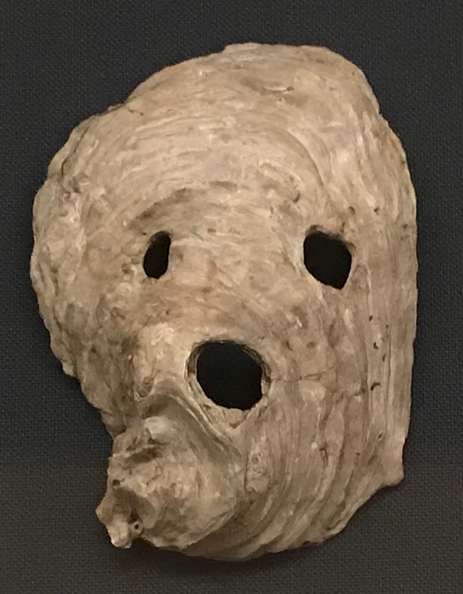 熊本県阿高貝塚から出土した縄文時代の貝製仮面。カキの貝殻をくり抜いて作られている。